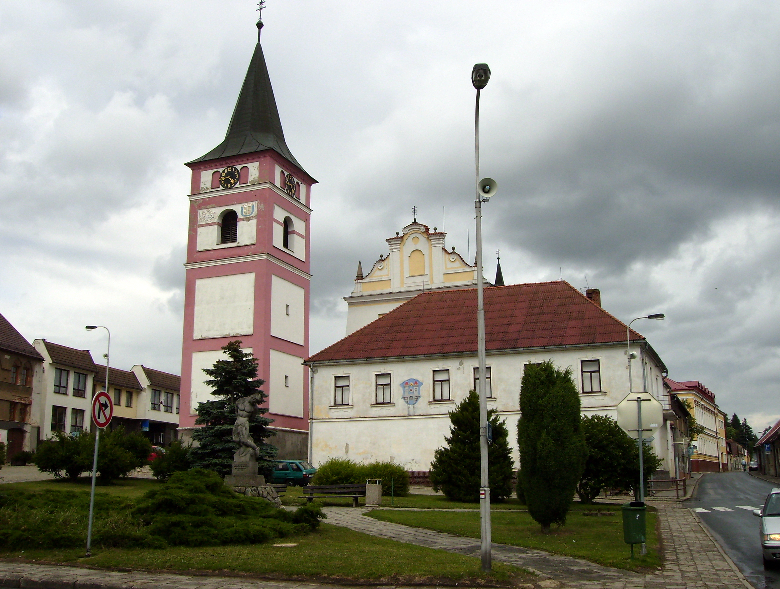 Kostel Povýšení svatého Kříže na náměstí v Černovicích u Tábora, okres Pelhřimov.